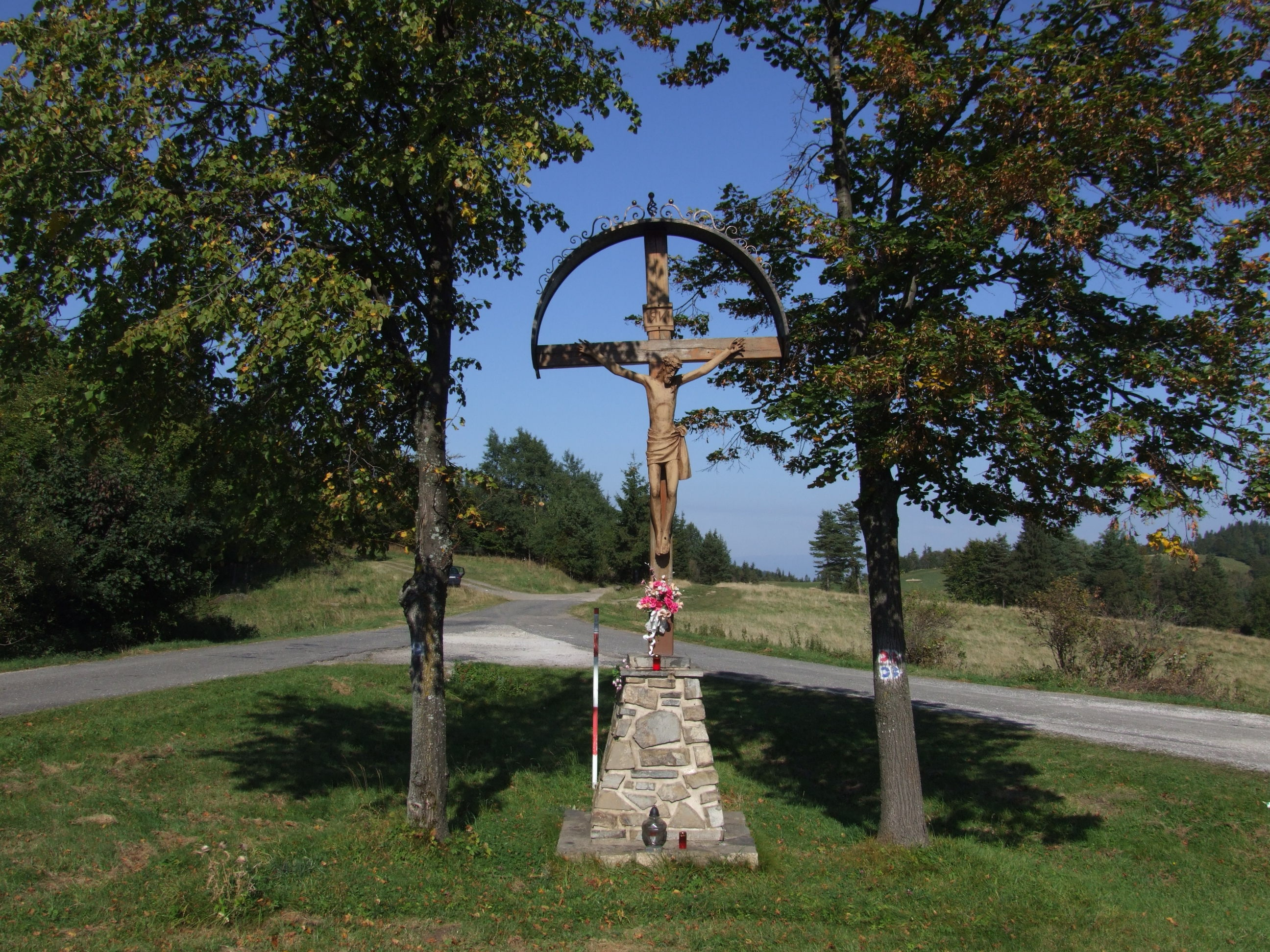 Łemkowski krzyż na Magurskiej Przełęczy (Magurské sedlo)